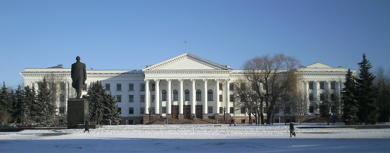 Краматорськ,_ДКіТ_НКМЗ: Краматорськ,_ДКіТ_НКМЗ